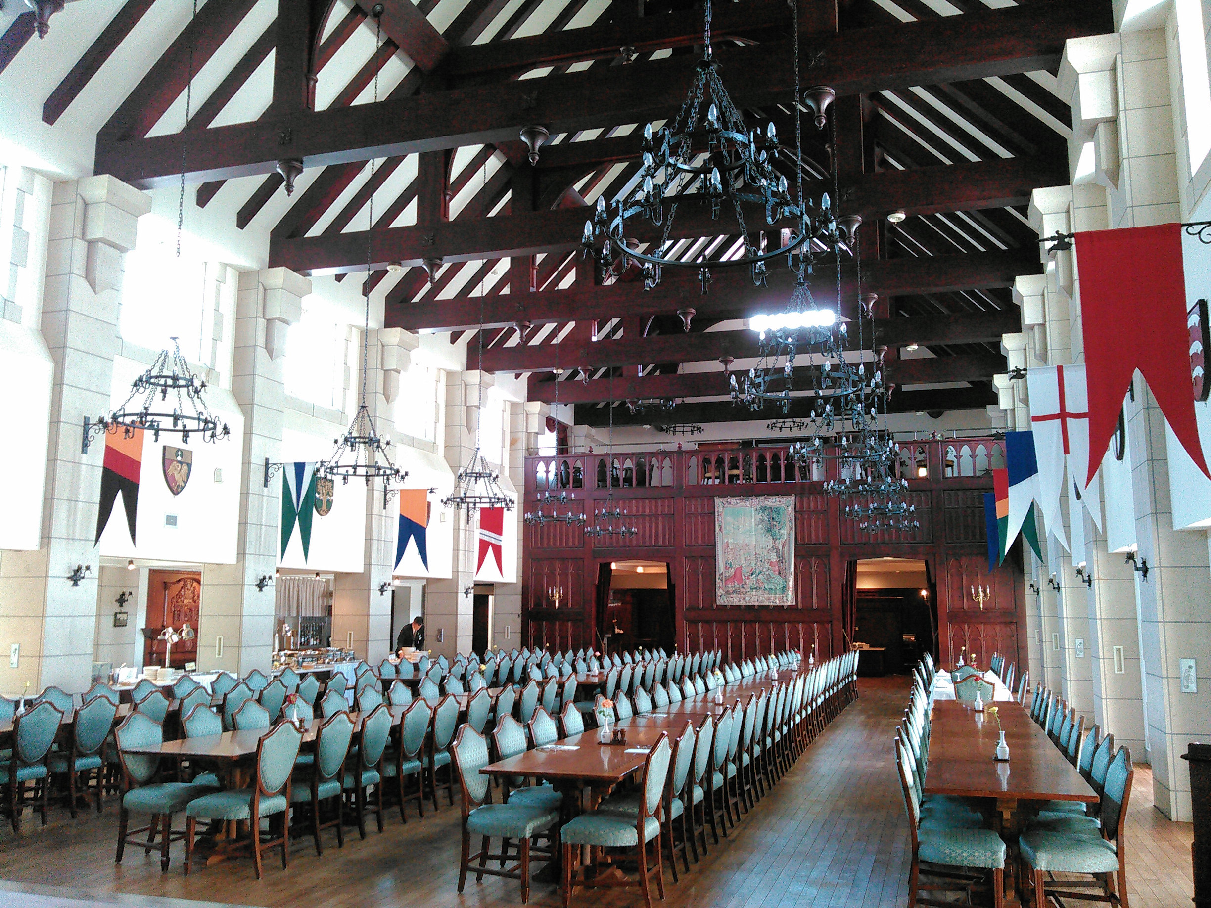 ブリティッシュヒルズ イギリスの学校等に見られる形式の食堂